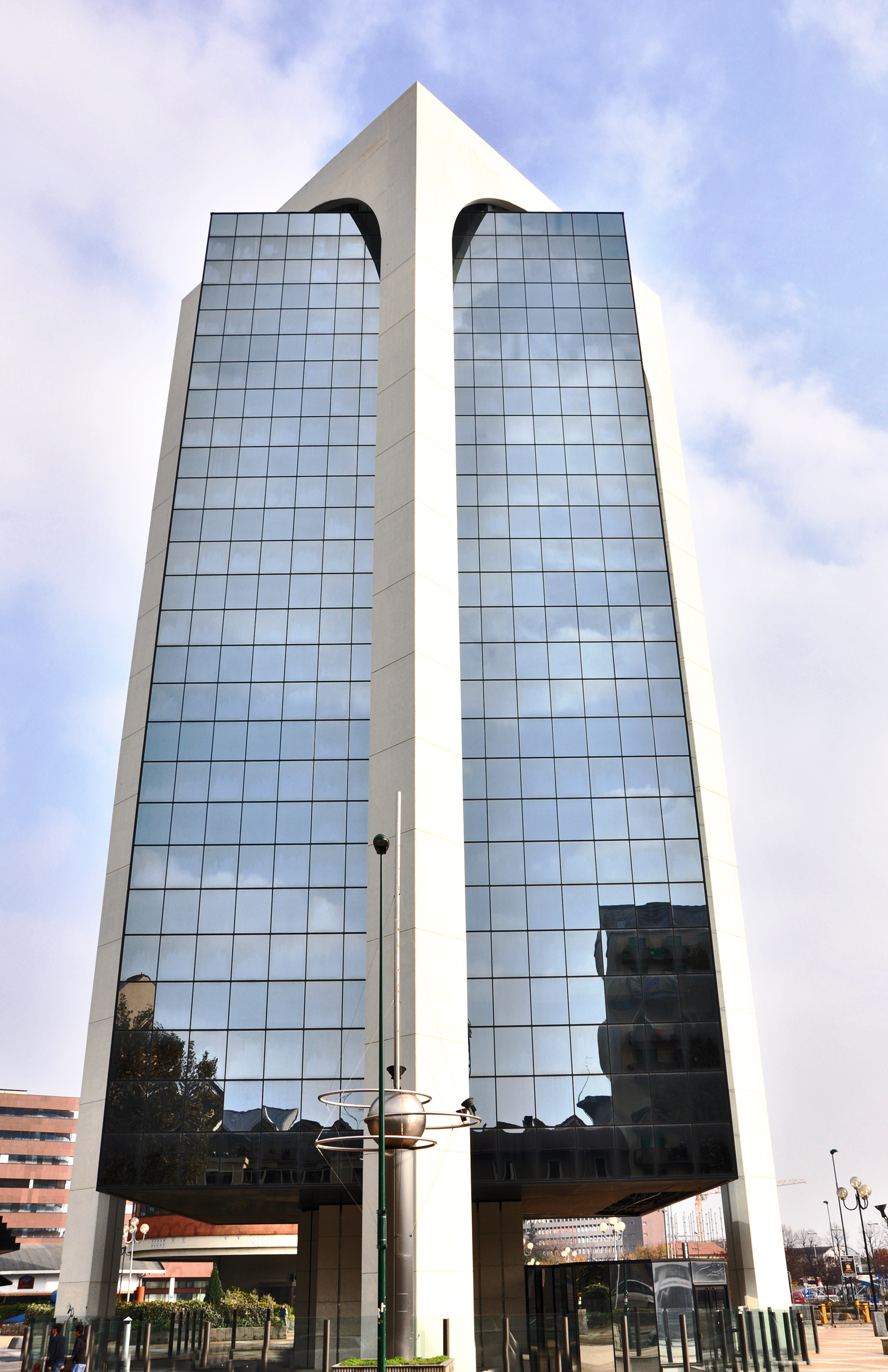 Torre appesa a Sesto San Giovanni, provincia di Milano